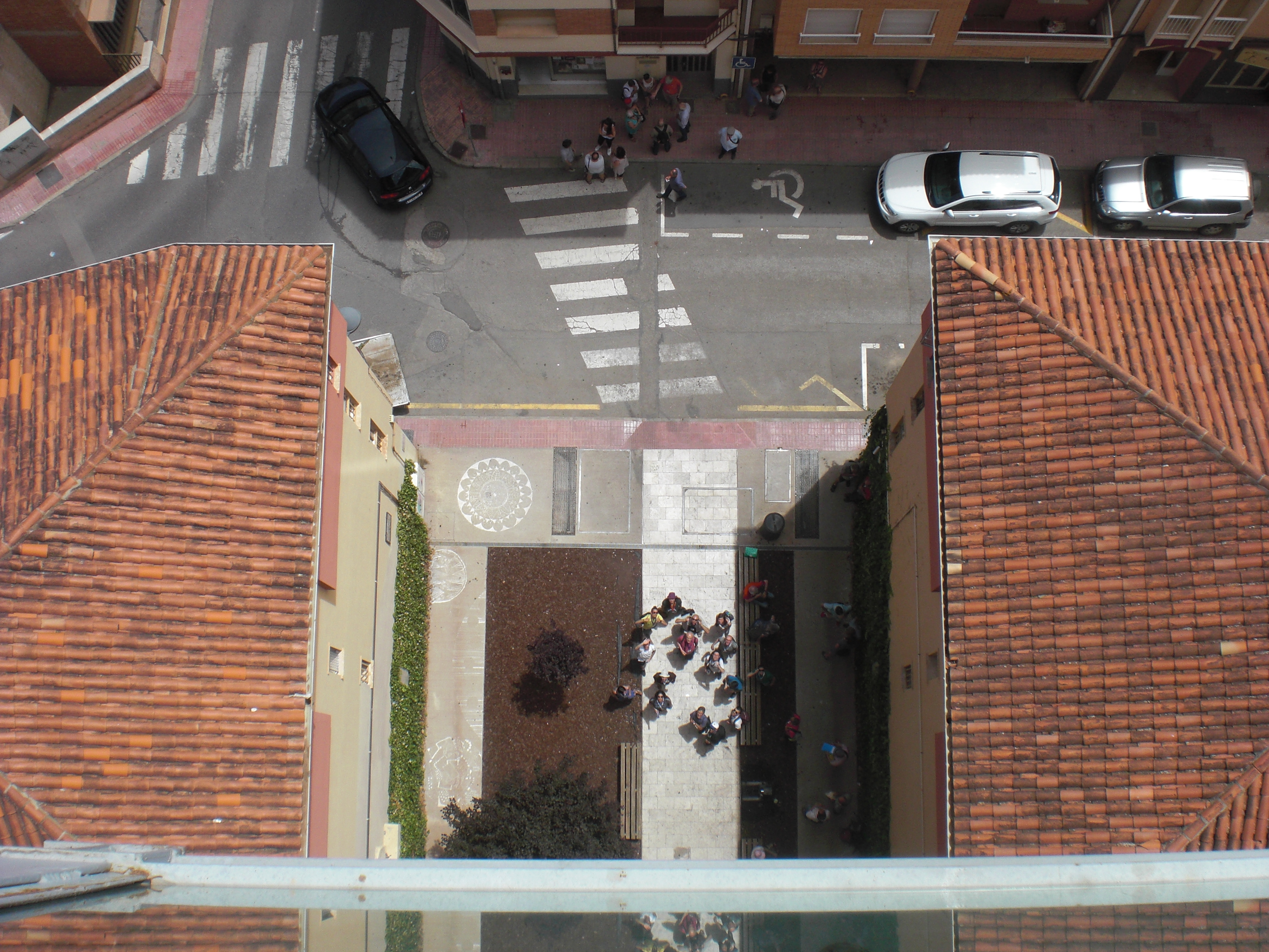 Esperanto placo